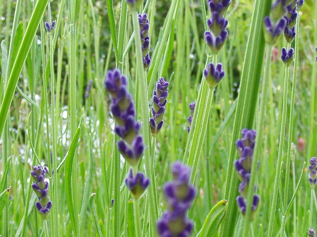 Lavandula augustifolia Hidcote